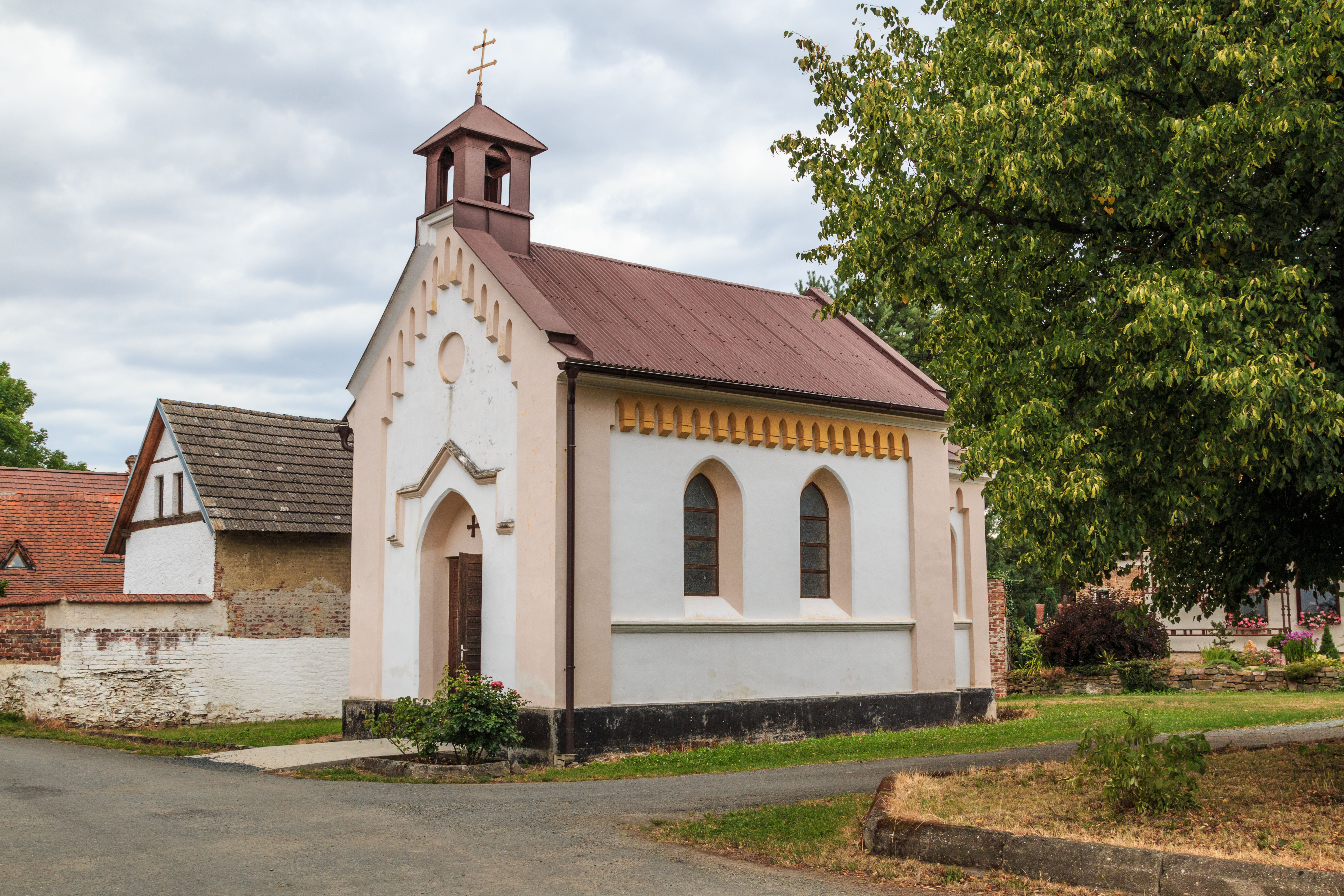 Biskupice kaple